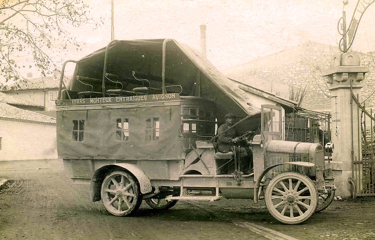 Autocar Carpentras Avignon